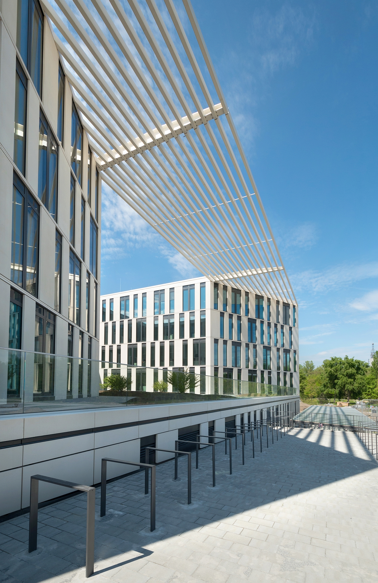 Investitionsbank des Landes Brandenburg (ILB), Aufnahme des neuen ILB-Gebäudes (Neubau), im Mai 2017, gegenüber dem Potsdamer Hauptbahnhof, Babelsberger Straße 21, 14473 Potsdam